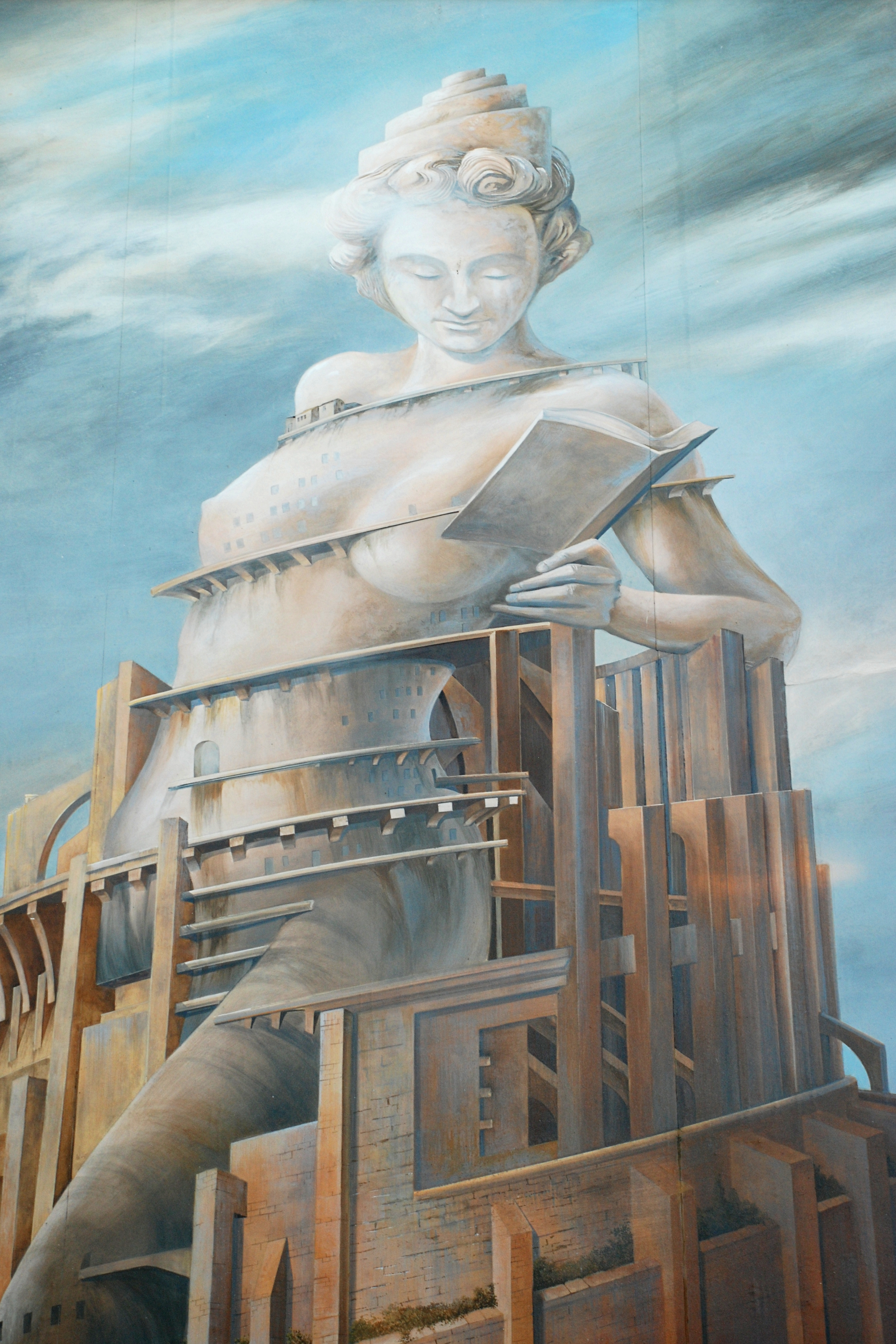 Belgique - Louvain-la-Neuve - La Tour Infinie - François Schuiten (2010) This photo of immovable heritage has been taken in the Walloon Region